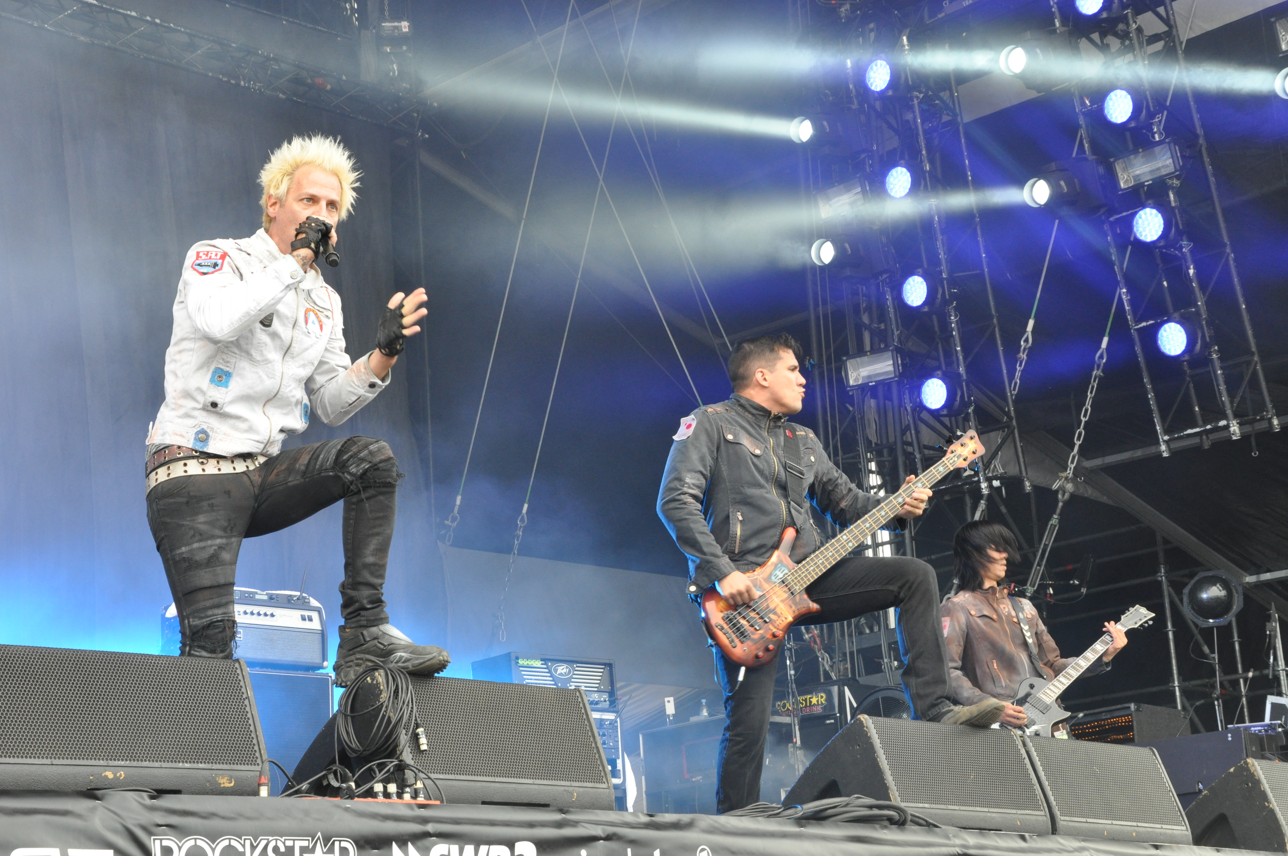 Powerman 5000 spielen auf der Alternastage bei Rock am Ring 2014